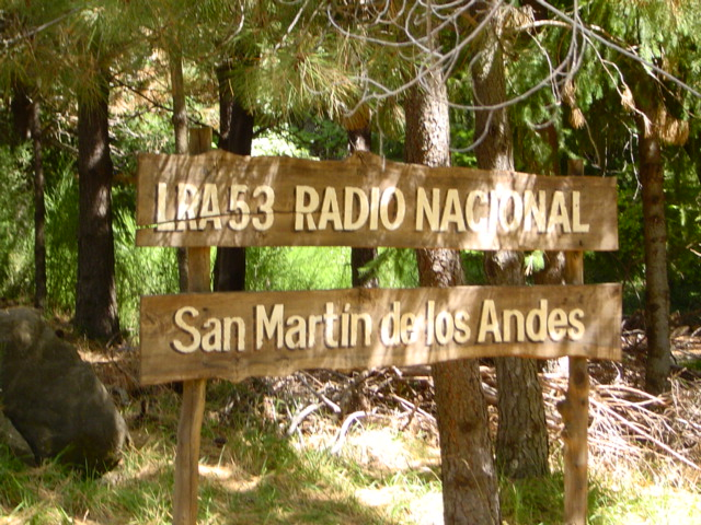 Cartel ubicado a la entrada de las instalaciones de LRA 53 Radio Nacional de San Martín de los Andes, Provincia del Neuquén, Argentina.